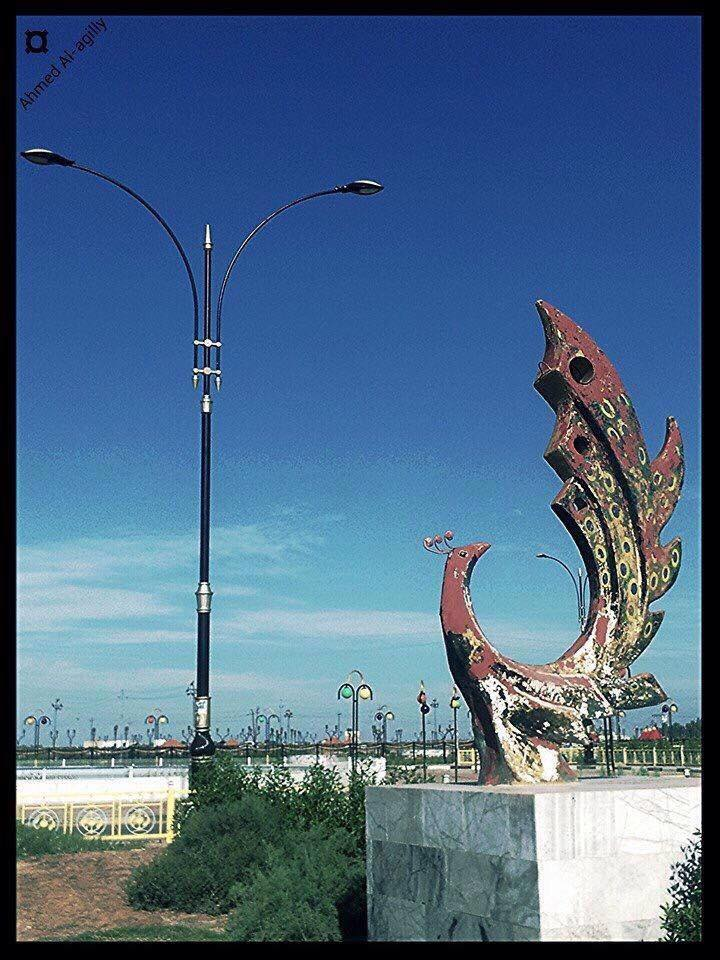 جانب من الناحية